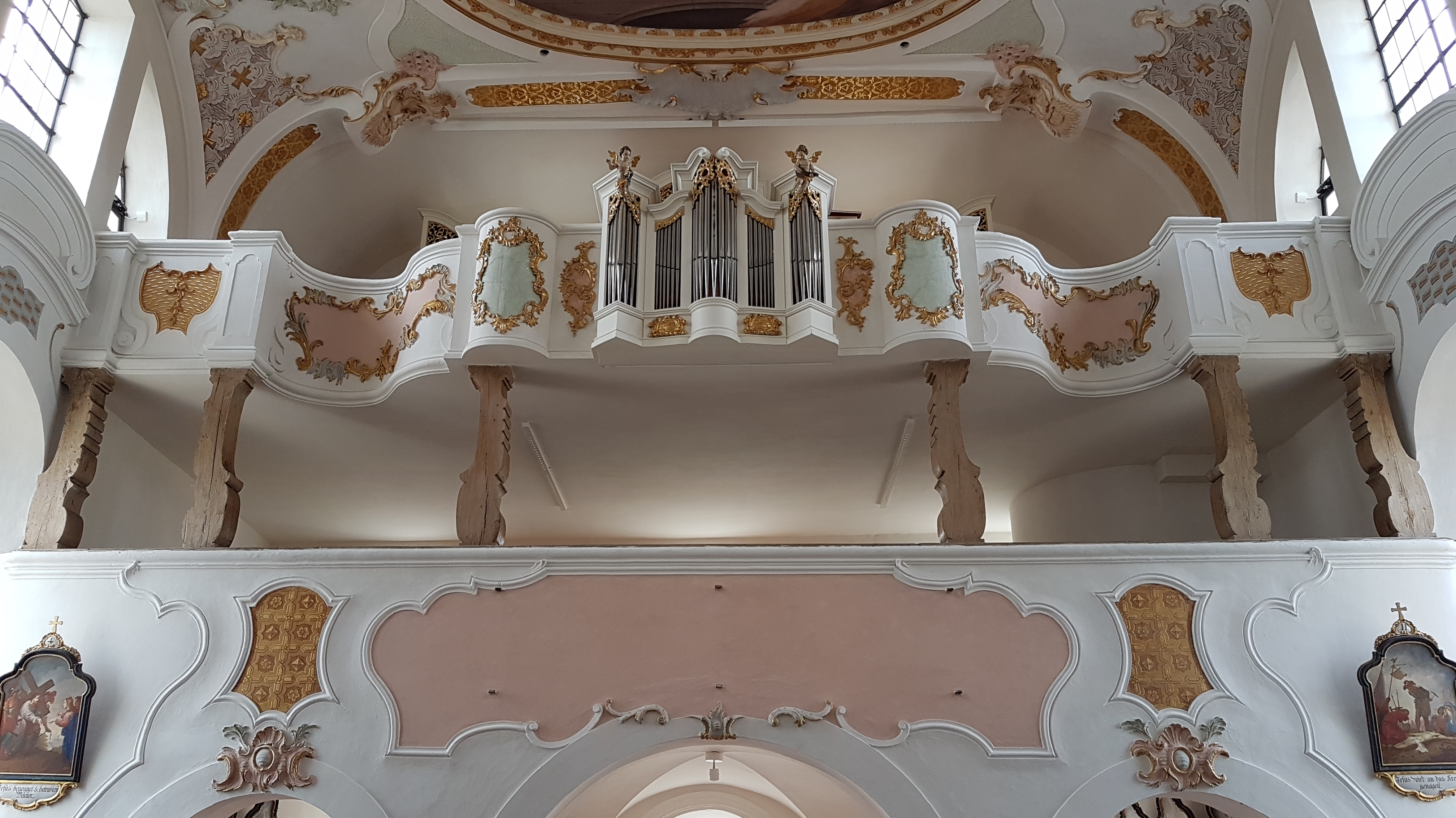 St. Ulrich (Eresing), die beiden Emporen mit Orgel